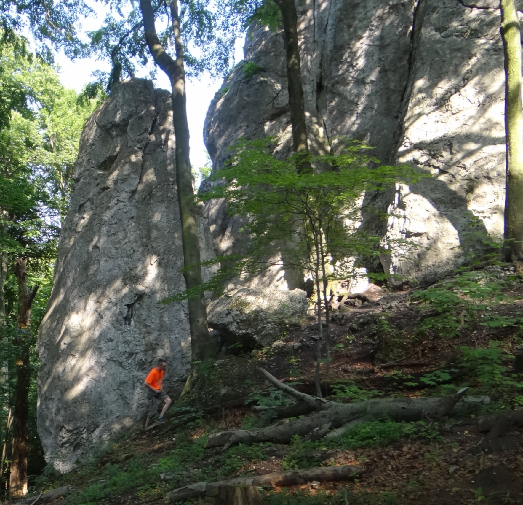 Skała Zielona Gora w rezerwacie "Zielona Góra"